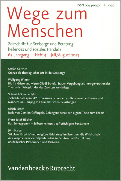 Wege zum Menschen, 65. Jg., Heft 4, Juli/August 2013